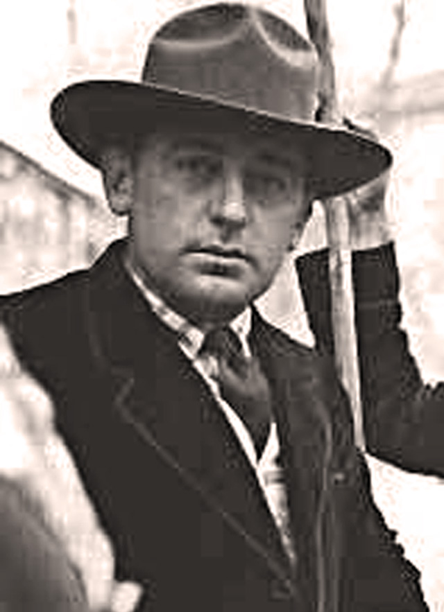 Marquis Folco de Baroncelli, fondateur de la Nacioun gardiano, le 16 septembre 1909